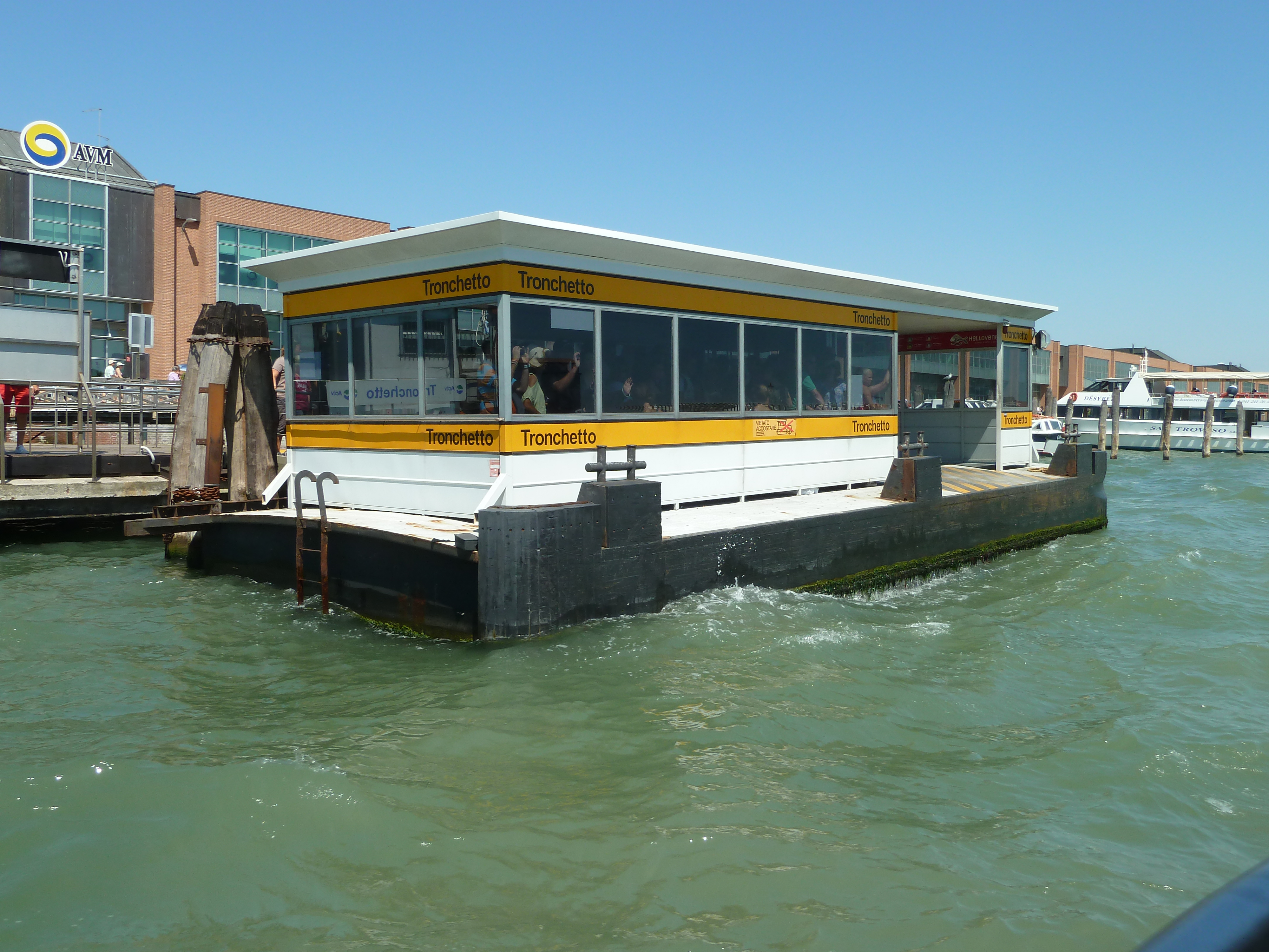 tronchetto